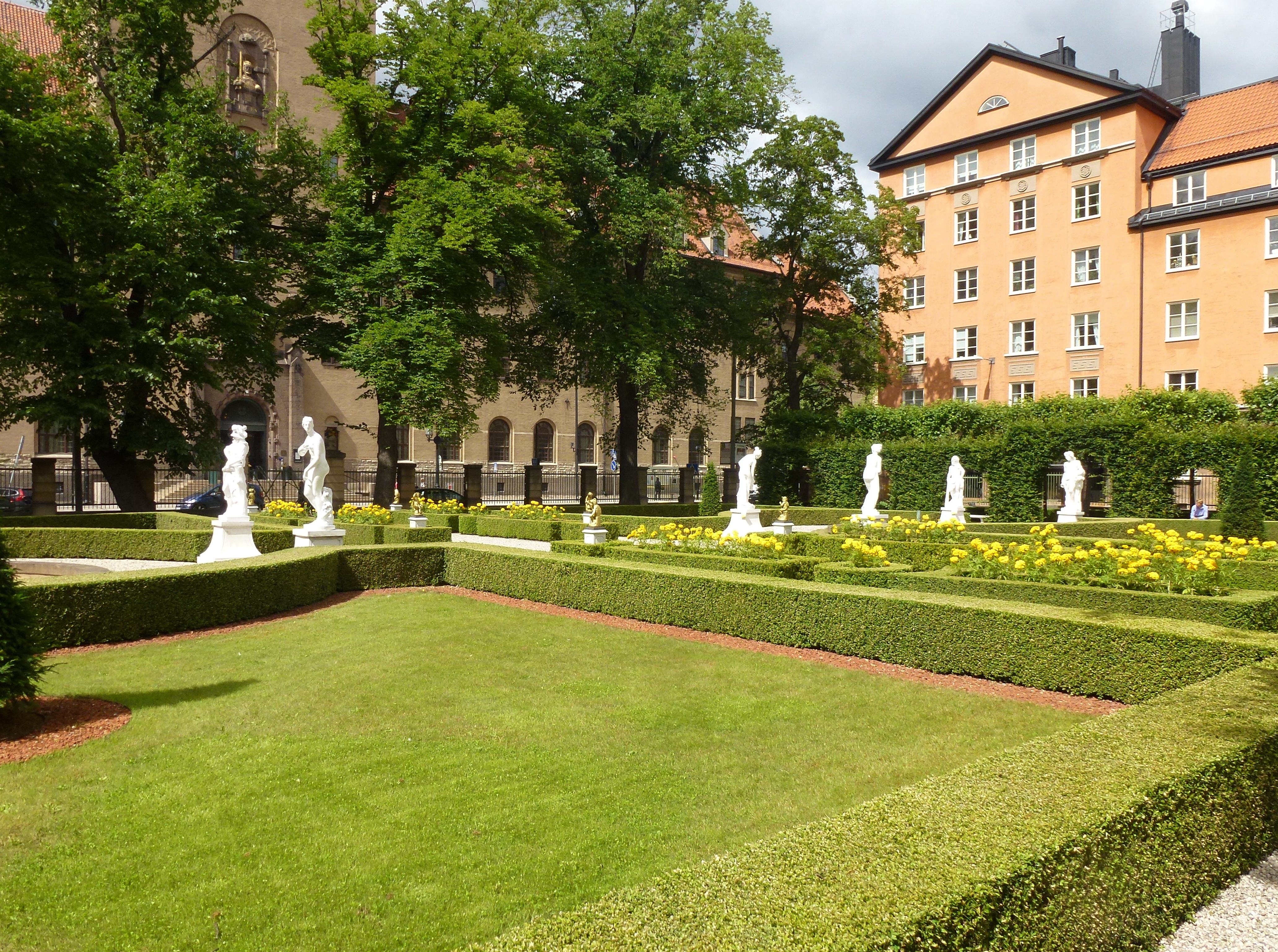 Piperska murens trädgård